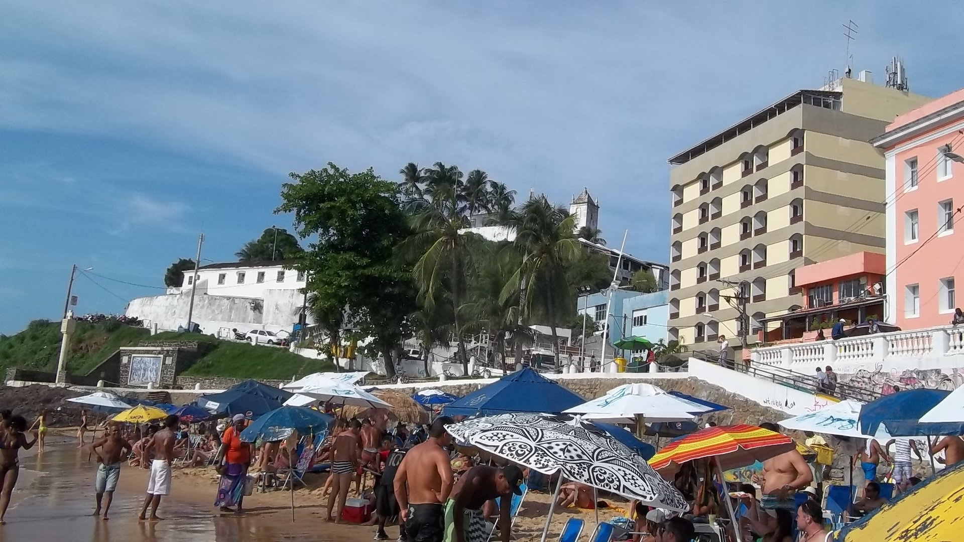 Playas del Porto da Barra, Salvador de Bahía